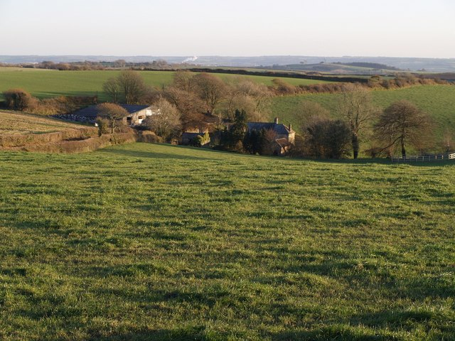 Accott